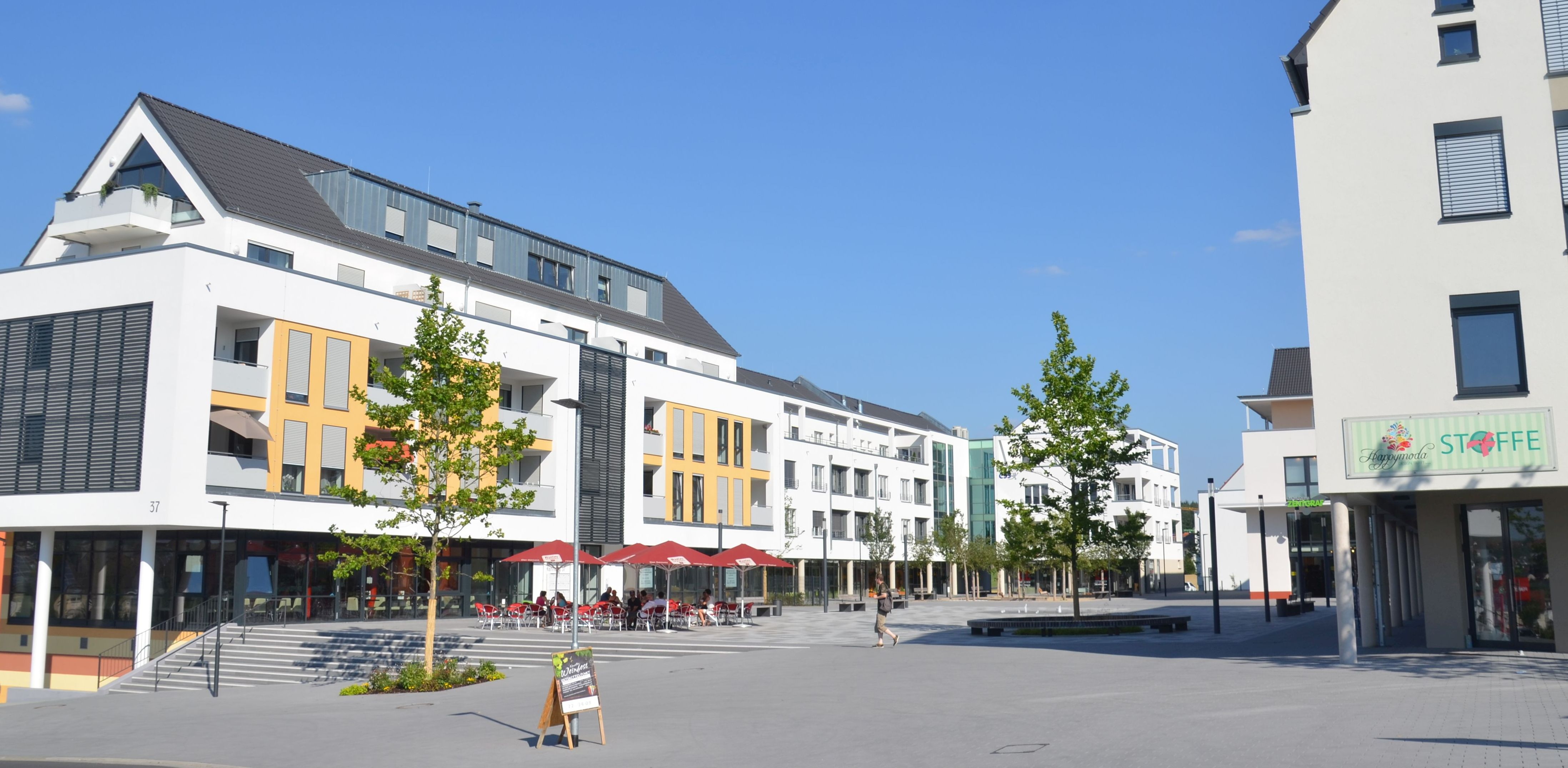 Eröffnung im September 2014